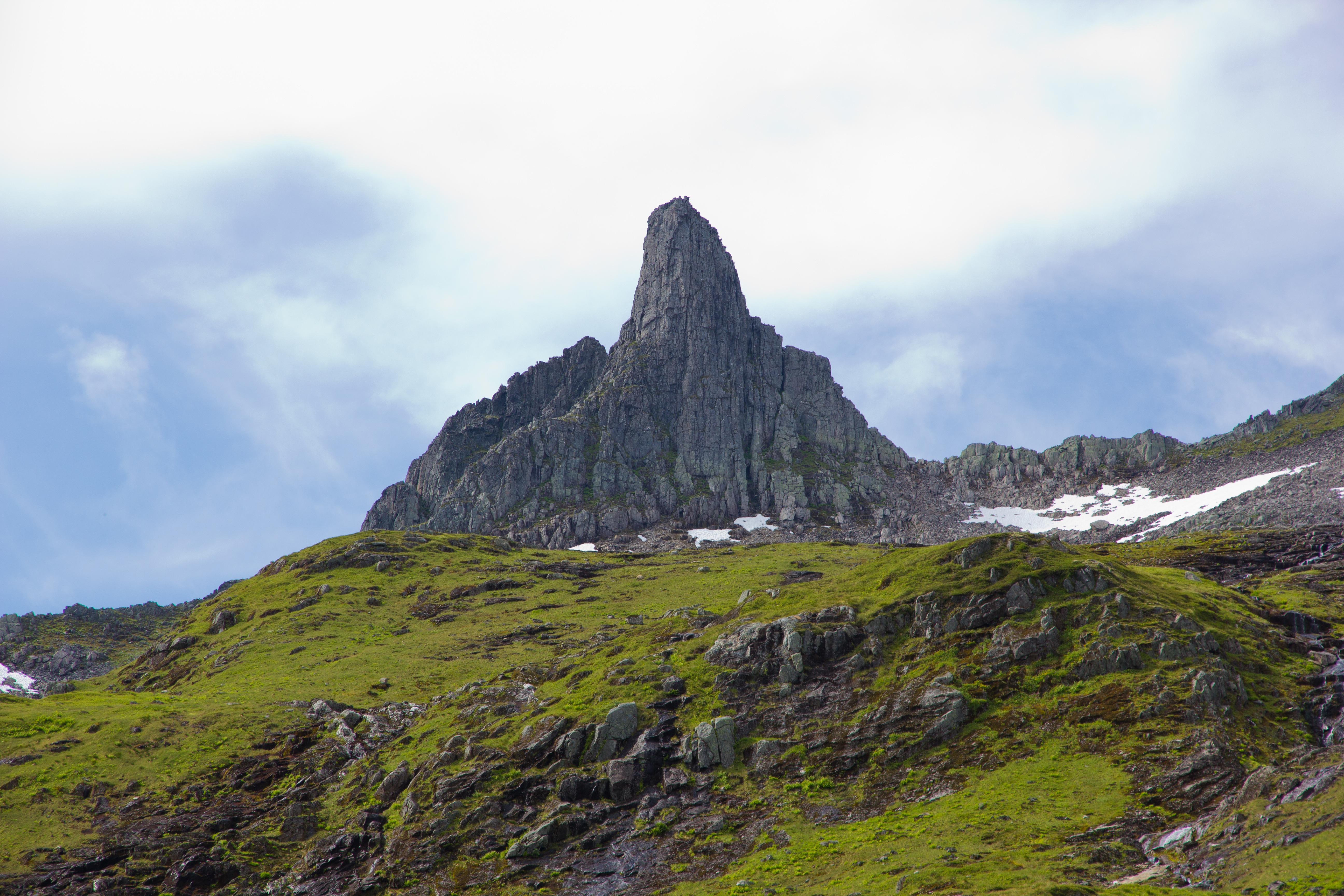 Fingeren 1180 moh. Fjell, fjelltopp i Sunnmørsalpene i Ørsta kommune i Møre og Romsdal, Norge. Turen opp fra Standalseidet. Fjellet ligger rett ved Kolåstinden.